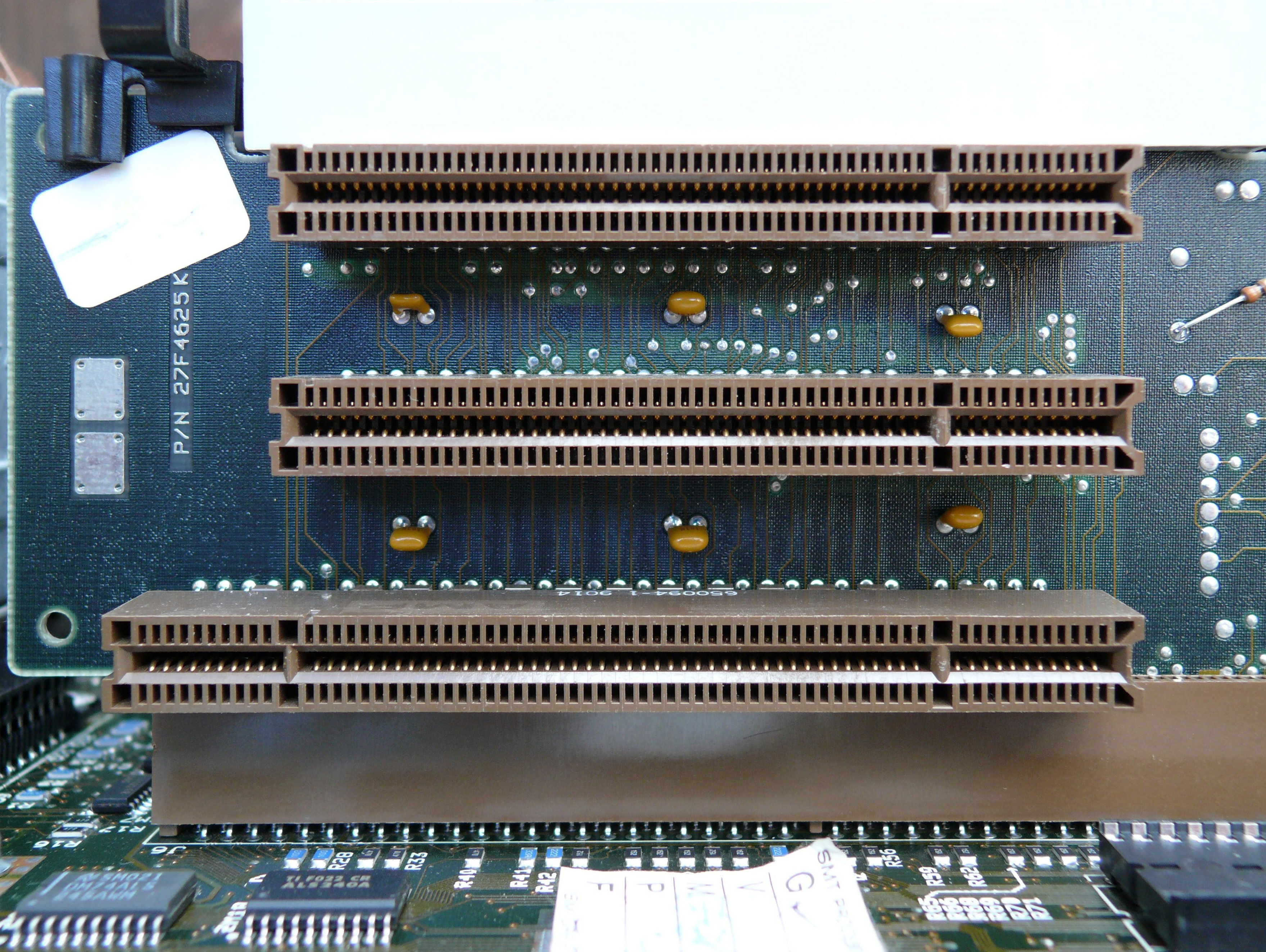 16-Bit Microchannel Slots aus einem IBM PS/2 Model 55sx. Oben zwei "normale" 16-Bit Slots, unten ein 16-Bit Slot mit AVE (Auxiliary Video Extension)-Steckplatz für 8514/A-Karten